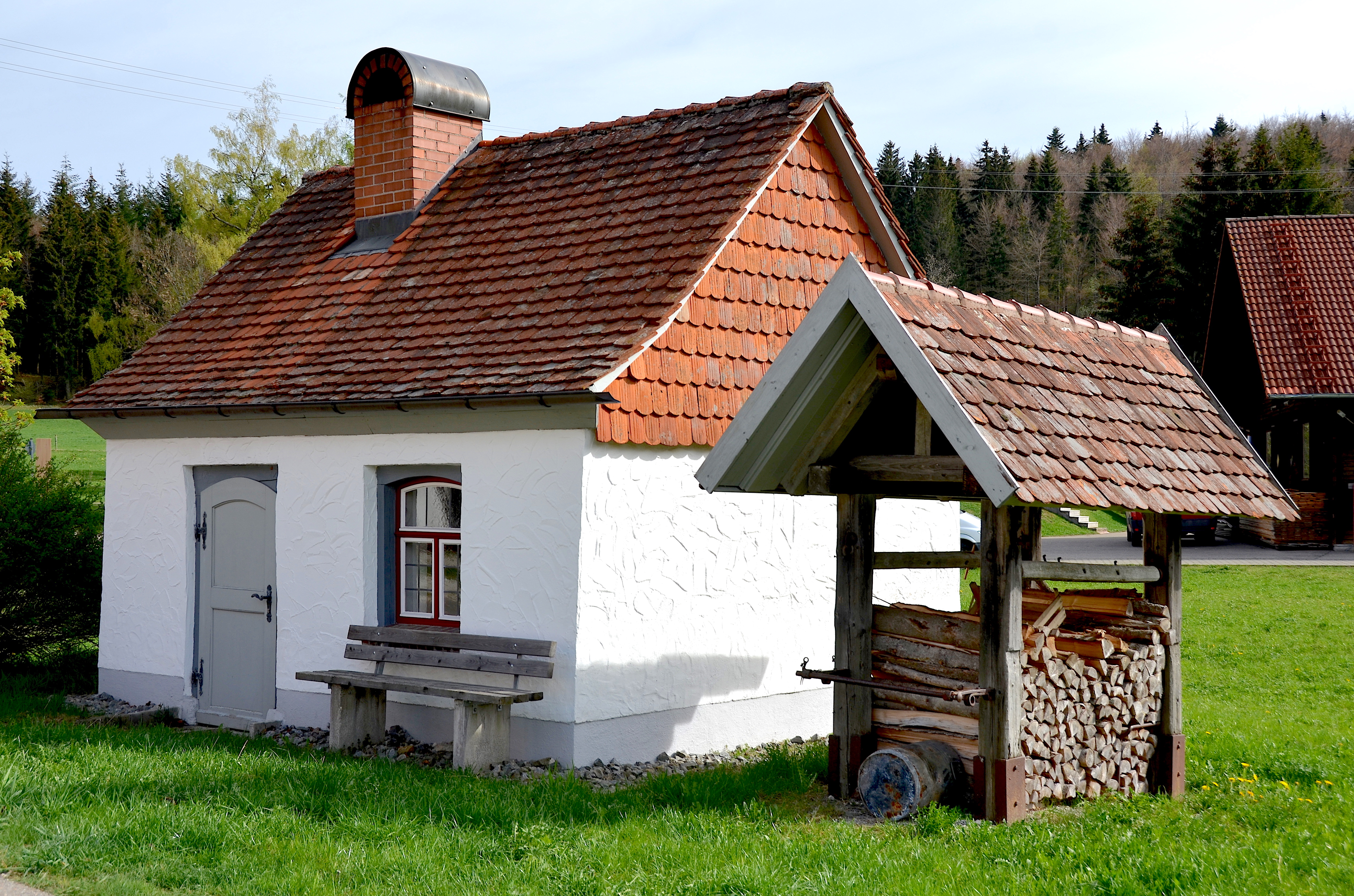 Dorfbackhaus in Geyerbad bei Oberdigisheim (2019)